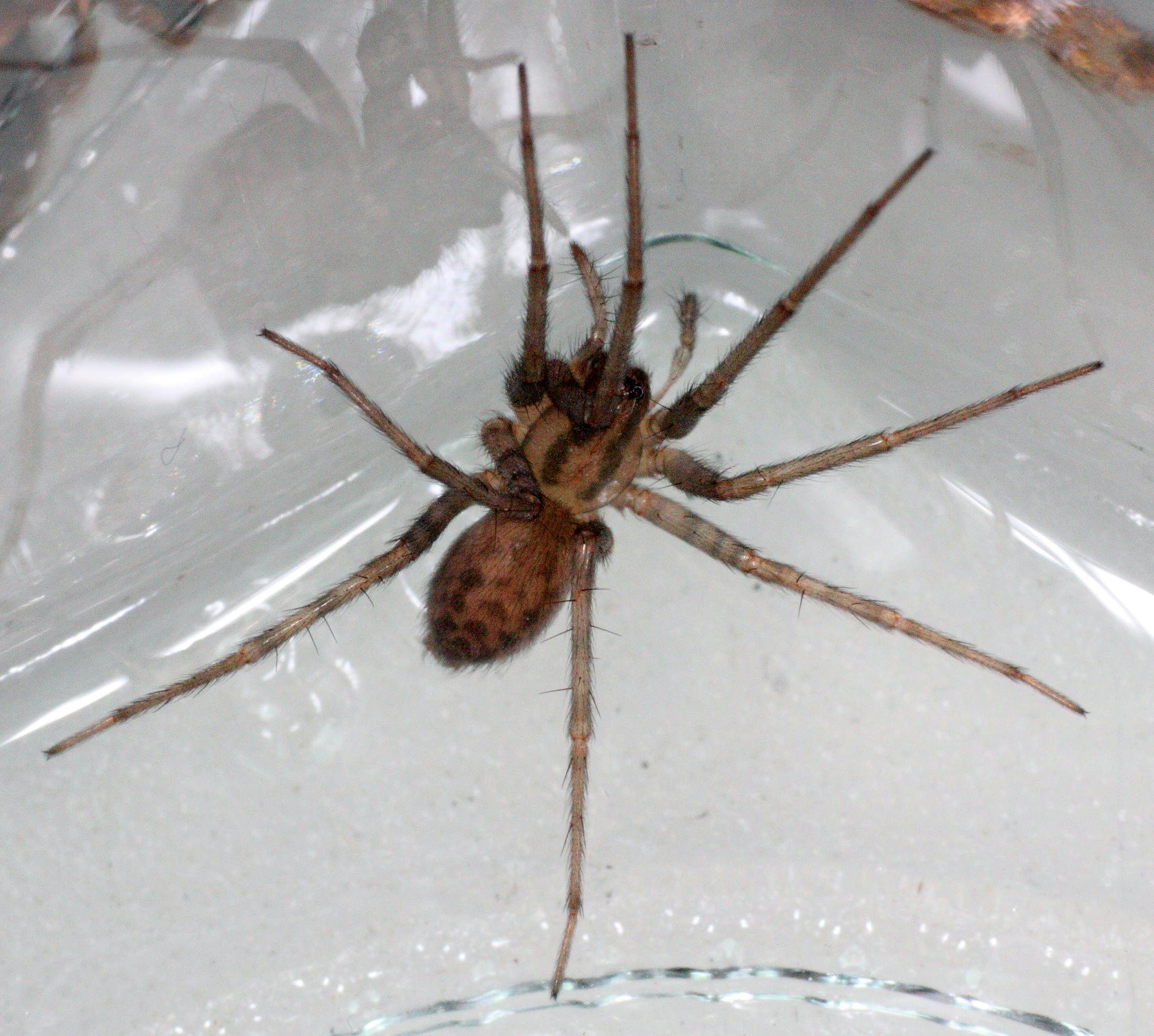 Hunn av husedderkopp Tegenaria domestica har siksakmønster på bakkroppen og svake mørkere ringer på beina. Dette er en hunn. Template:Byline